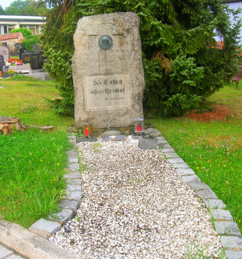 Vertriebenendenkmal, Gedenkstein auf dem kommunalen Friedhof der Marktgemeinde 92693 Eslarn (rechtsseitig beim Eingang)